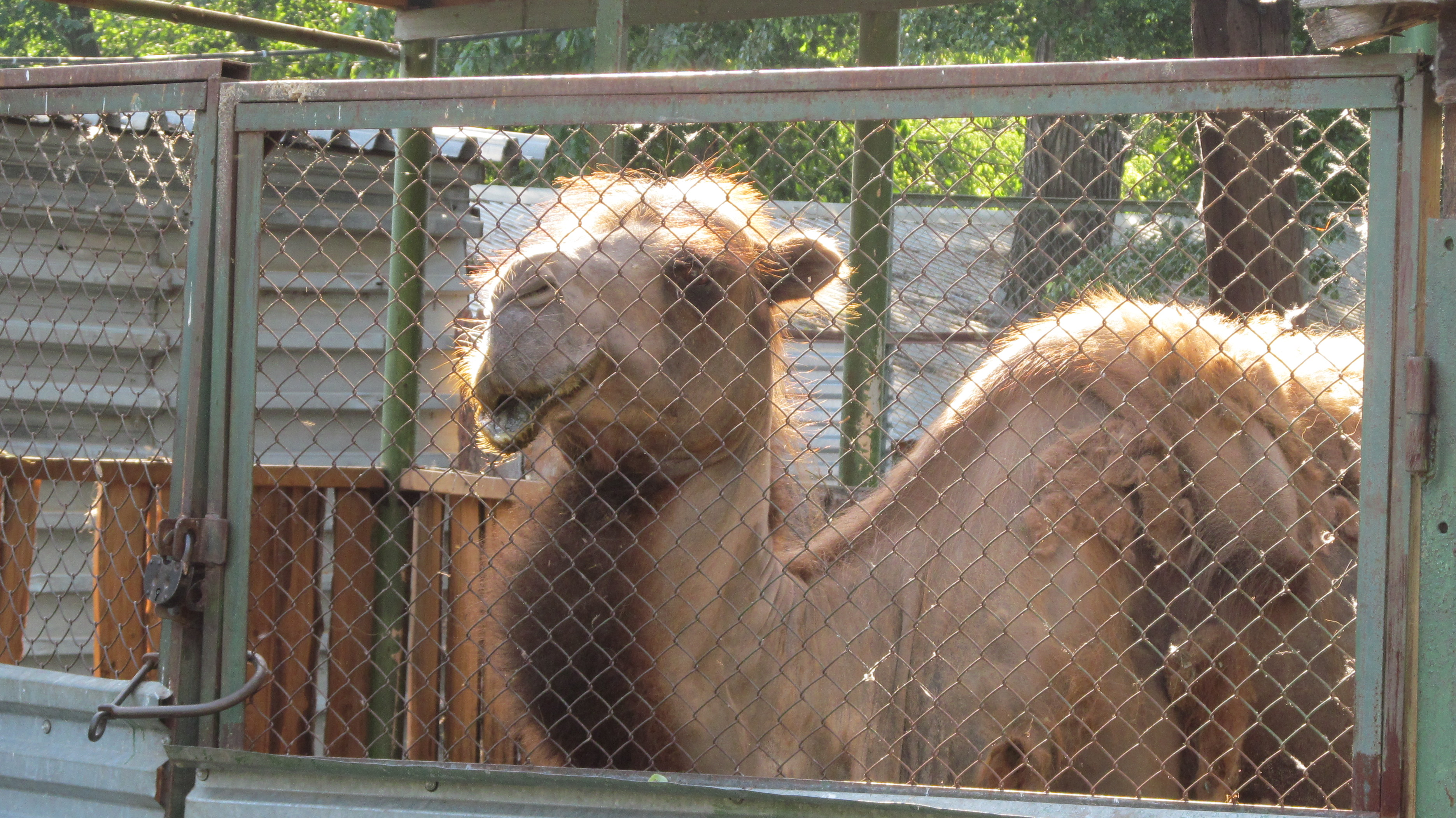 фото верблюда в Пермском зоопарке